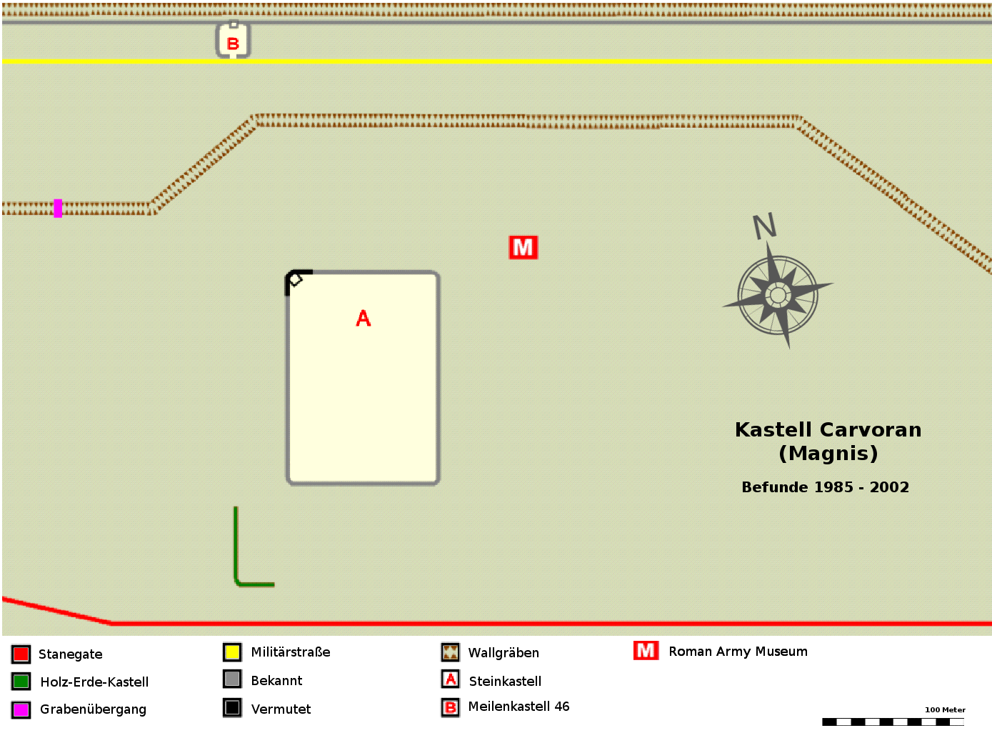 Befundplan des Kastell Carvoran/Magnis, Hadrianswall, 1. bis 2. Jahrhundert n.Chr.